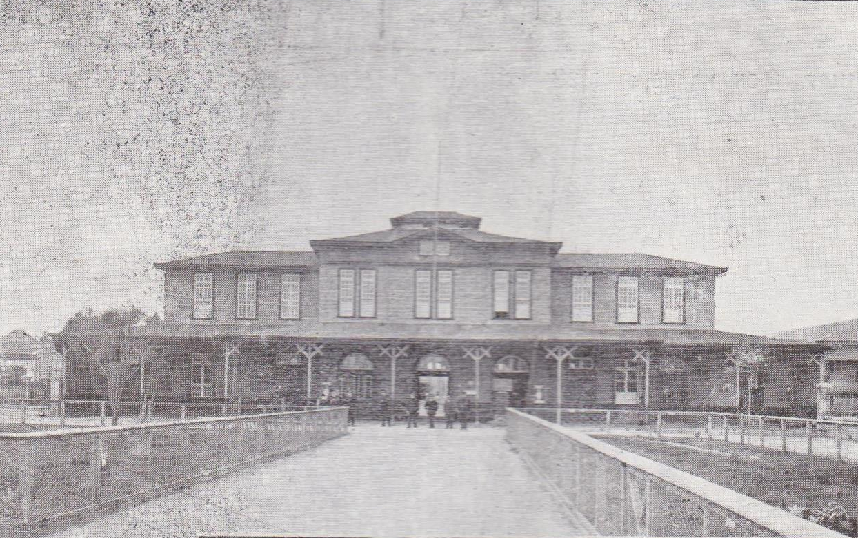 Estaciones del sur, estación de Puerto Montt. Circa 1929. Imagen obtenida a partir del libro (in Spanish) (1929) Ferrocarriles del Estado de Chile (3rd ed.), Santiago: Impr. Harris y Pascual